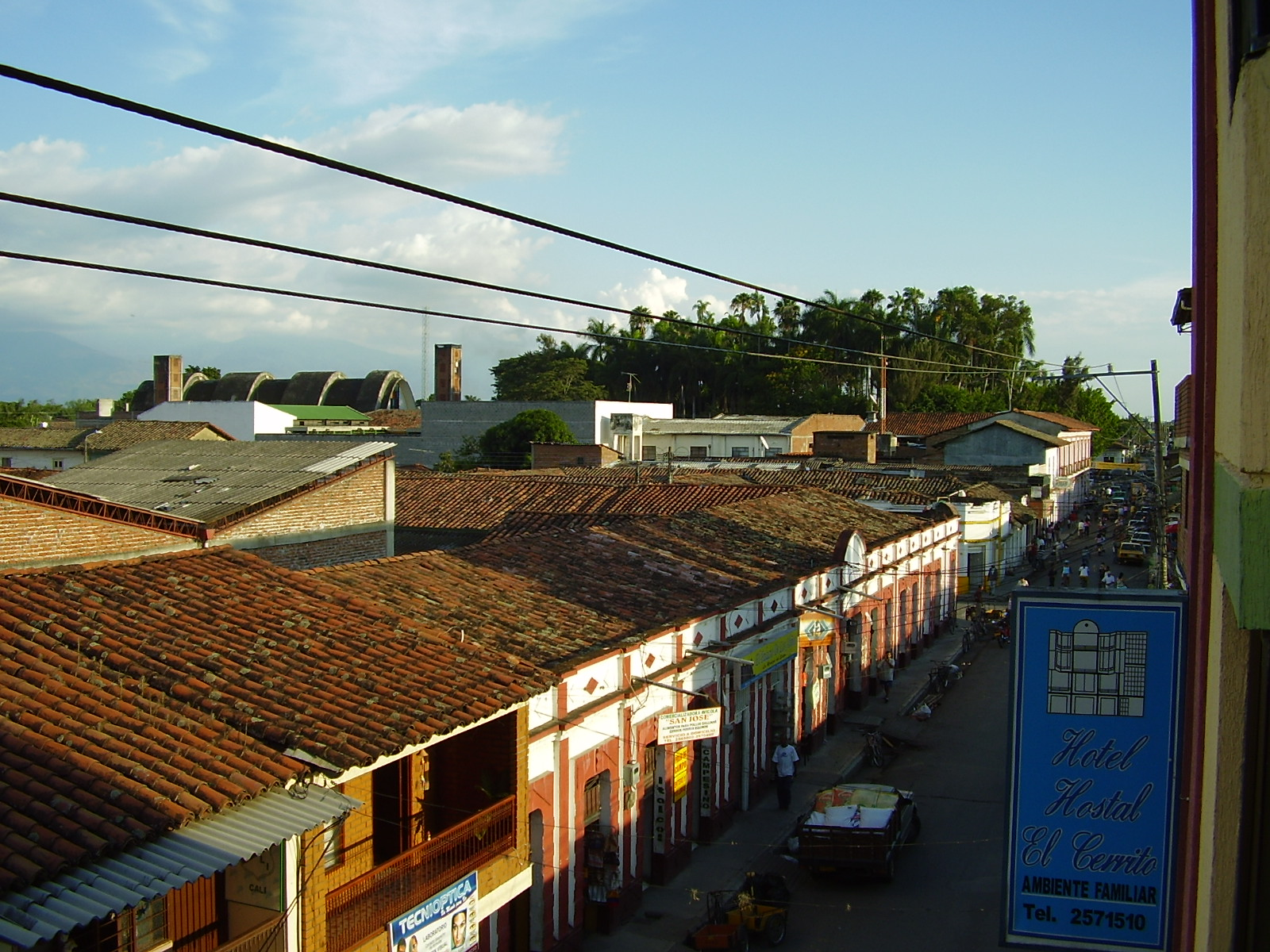 Sector Antiguo de la ciudad de El Cerrito Cerrito